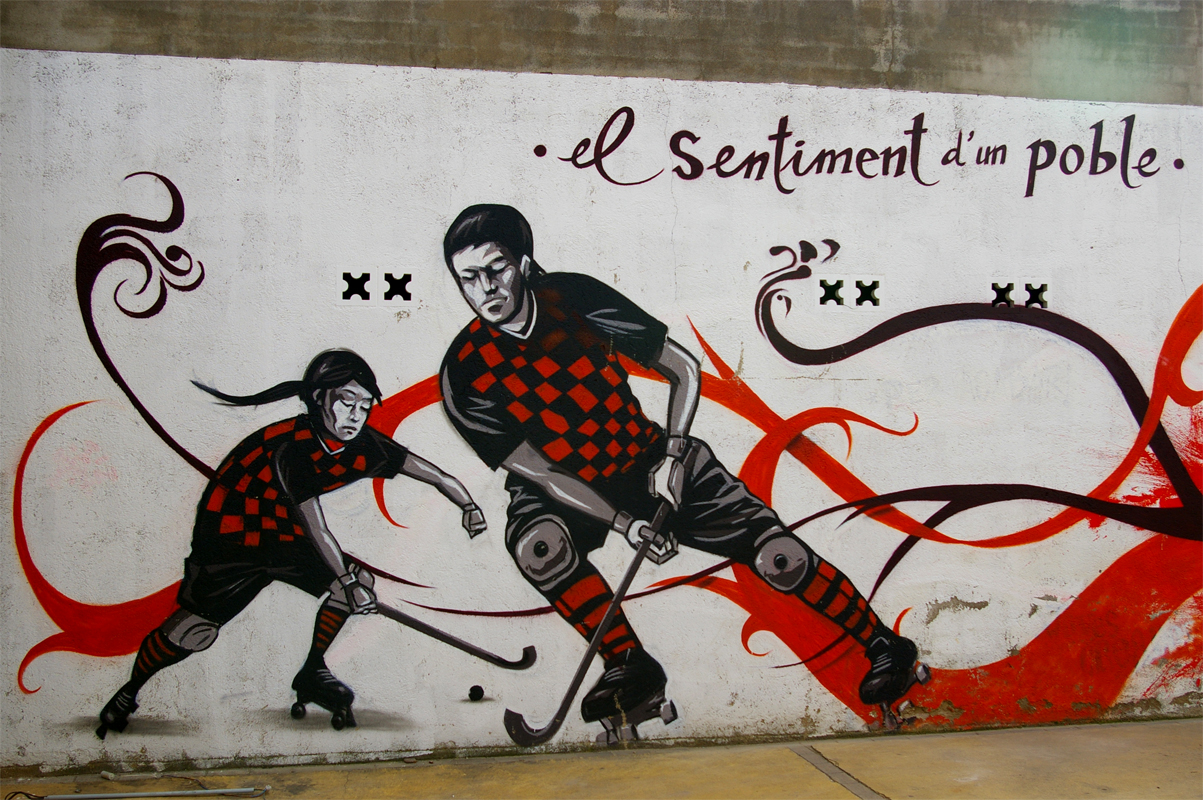 Mural a Sant Sadurní d'Anoia (Alt Penedès, Catalunya)